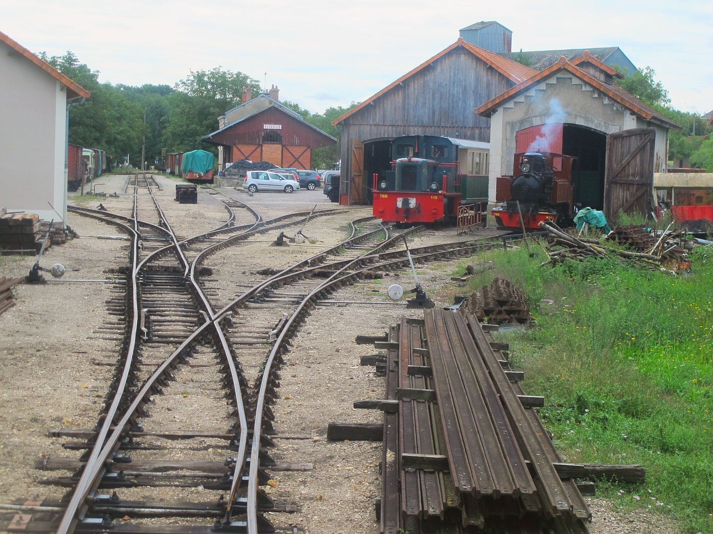 Les installations du Train du Bas-Berry en gare d'Écueillé le 23 août 2015.